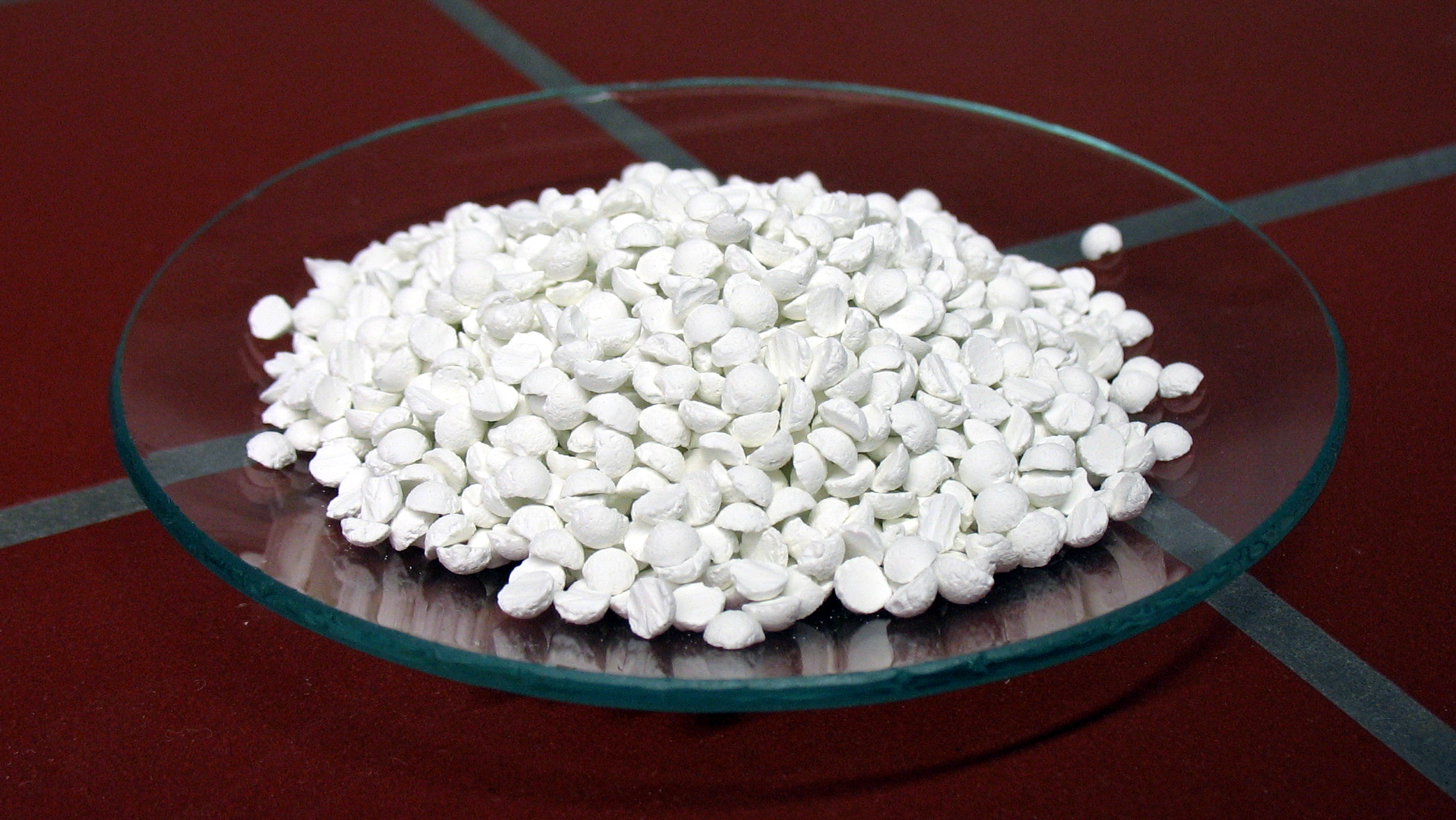 Natronkalk gekörnt 3-5mm der Firma CARL ROTH GMBH + CO. KG